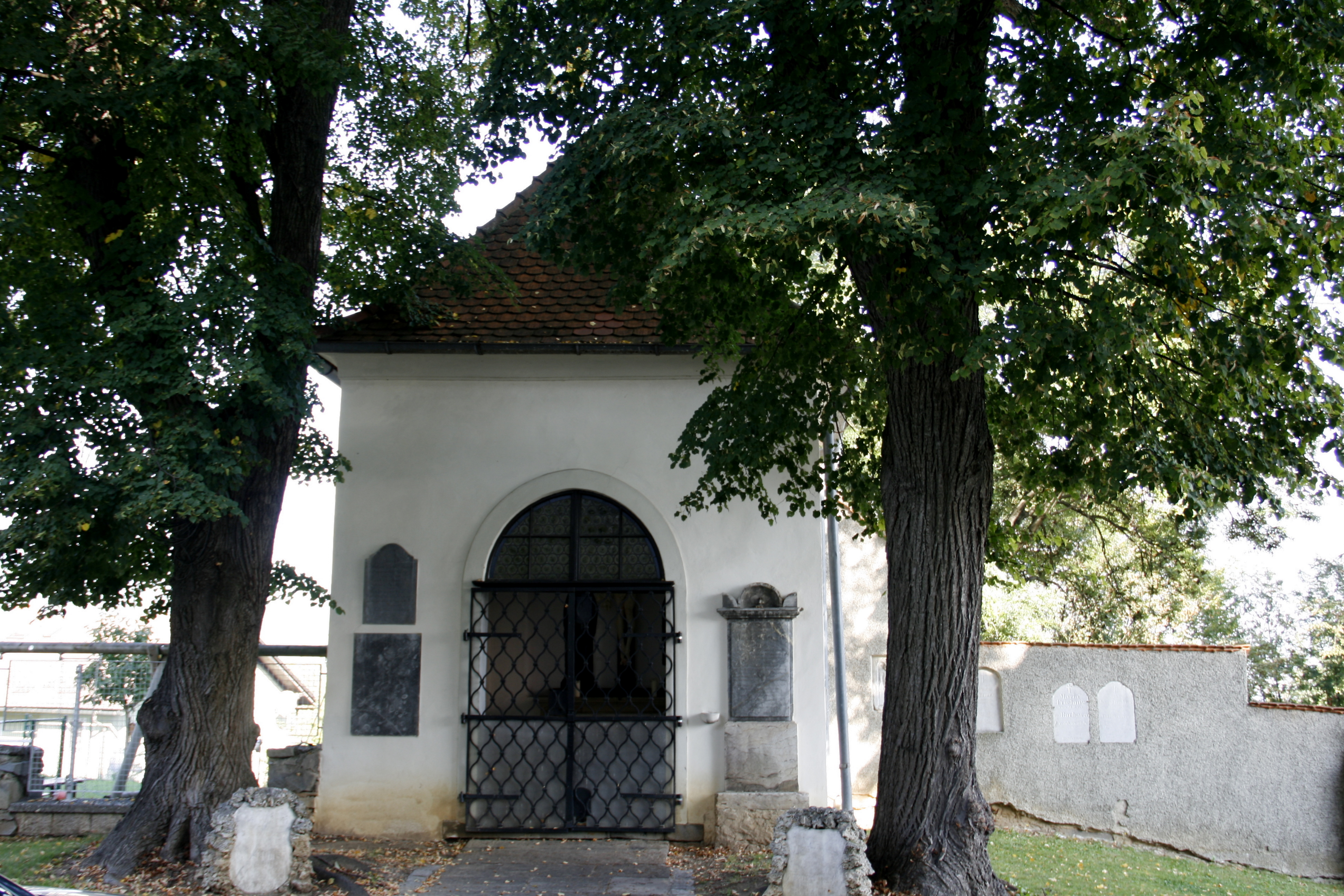 Jubiläumskapelle